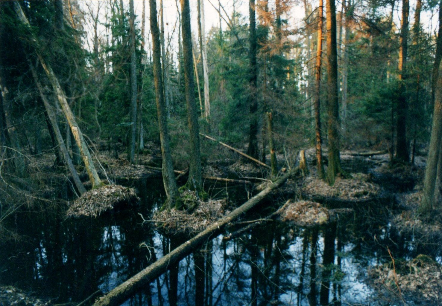 Autor: Adrian Grzegorz Rok wykonania: 2001